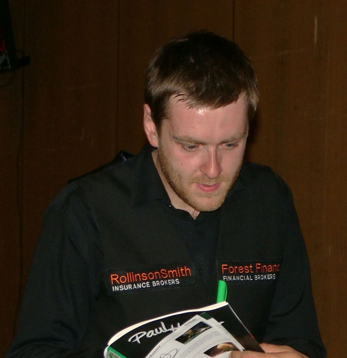 Snookerspieler Ricky Walden während des Paul Hunter Classic 2008 in Fürth.